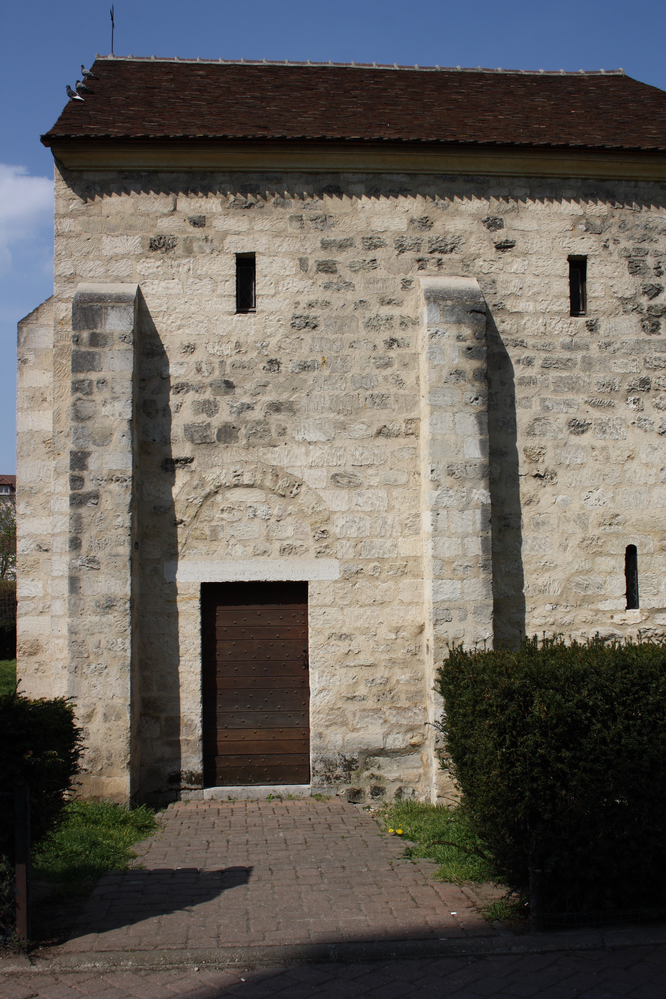 Romanische Kapelle St-Jean-Baptiste in Argenteuil im Département Val-d’Oise (Île-de-France/Frankreich)